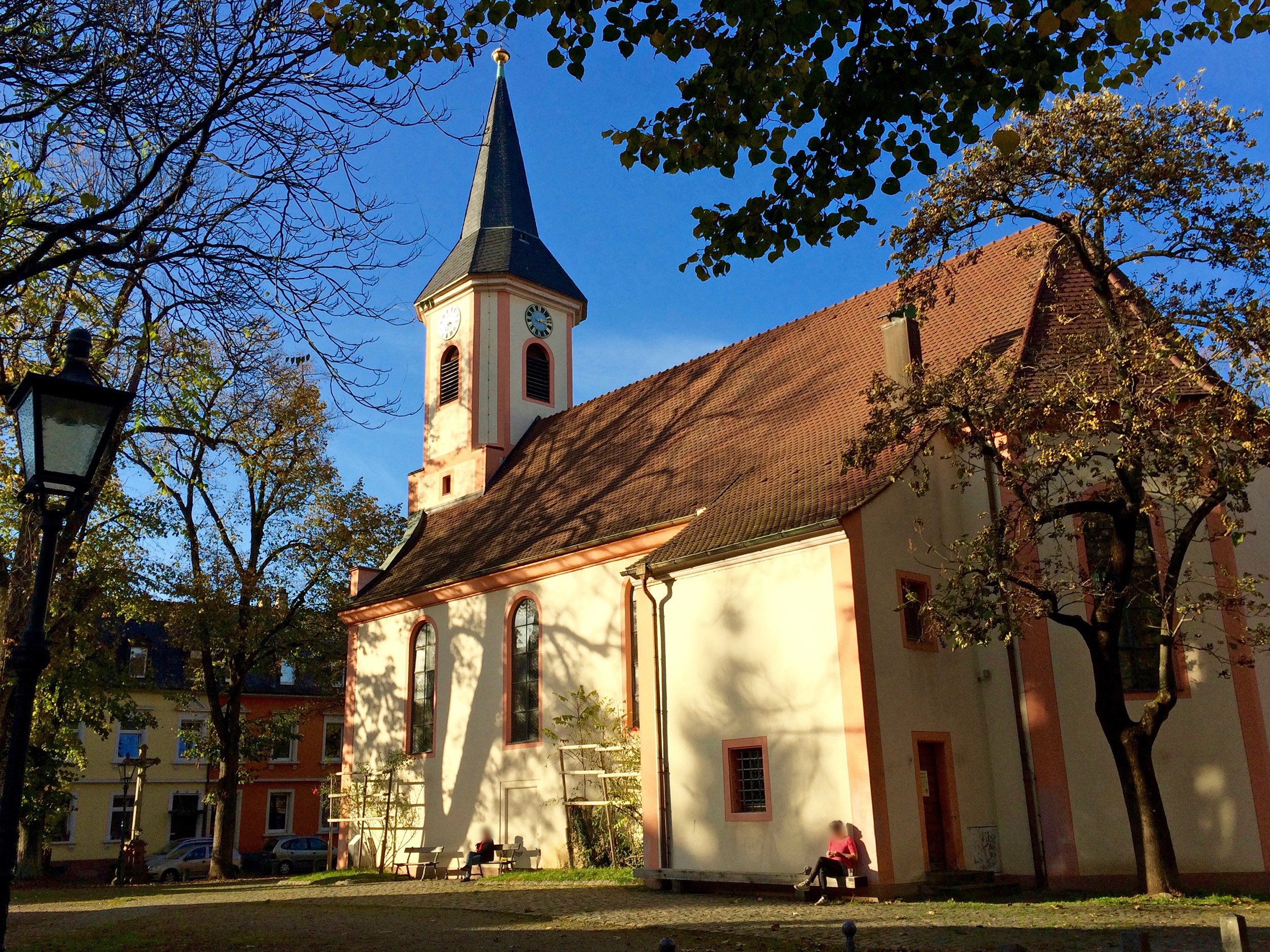 Blick auf die Pfarrkirche St. Cyriak und Perpetua in Freiburg